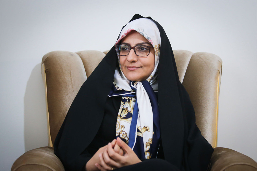 Shohreh Pirani, Dariush Rezaei-Nejad, wife